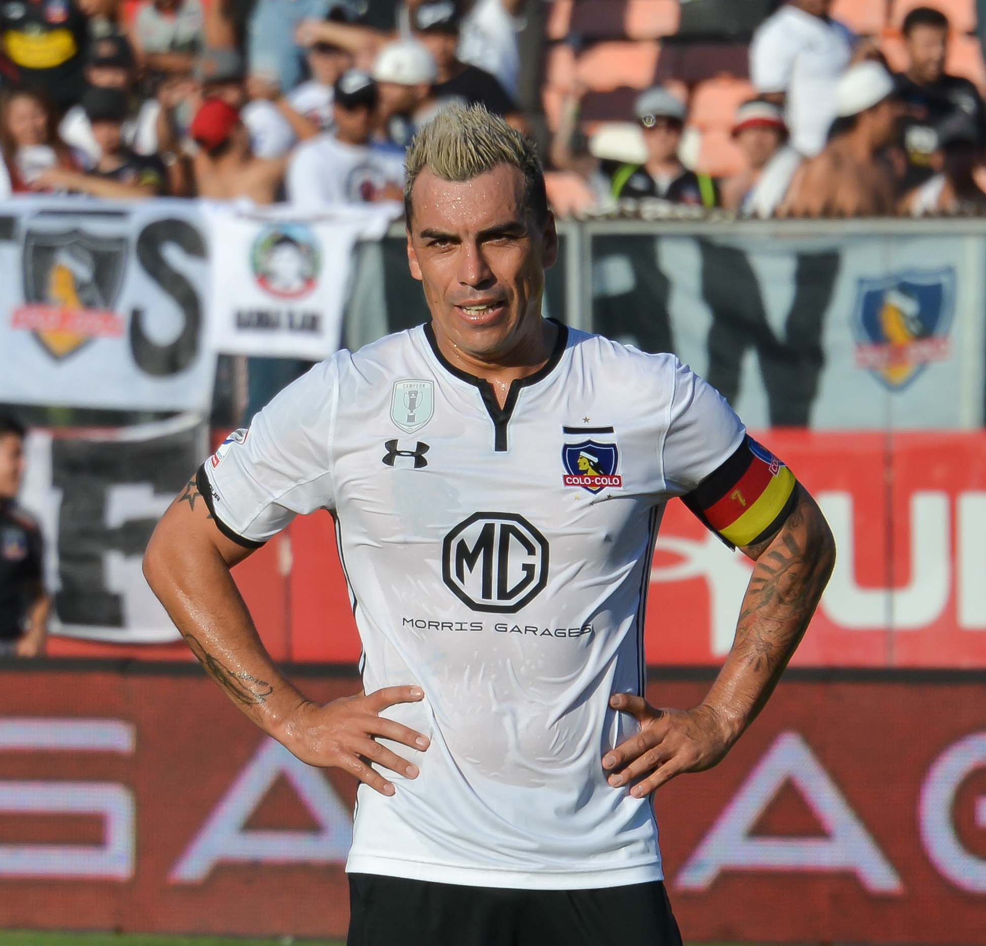 Esteban Paredes, Colo Colo v Huachipato, Estadio Monumental, Santiago, Chile.